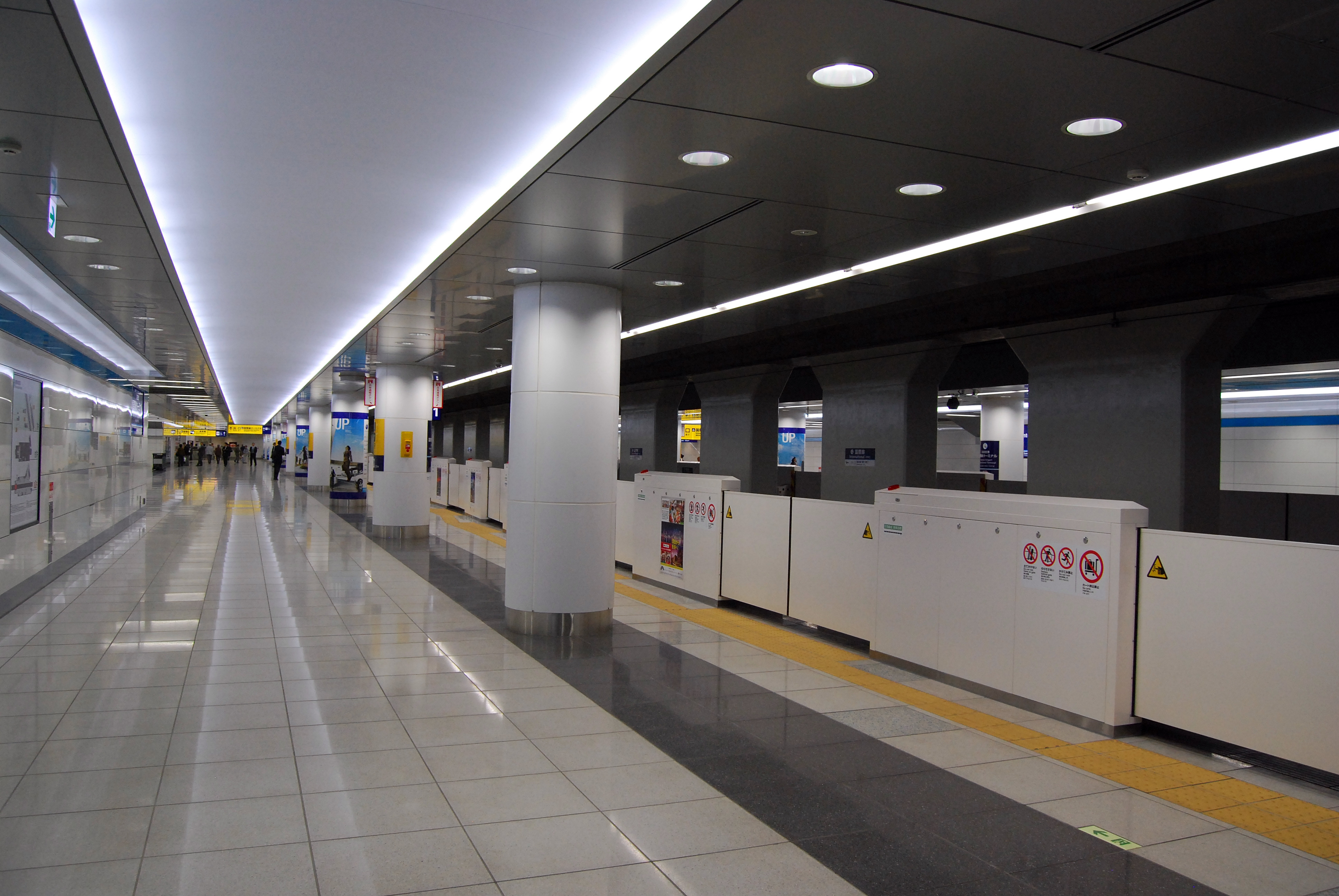 羽田空港国際線ターミナル駅1番線ホーム